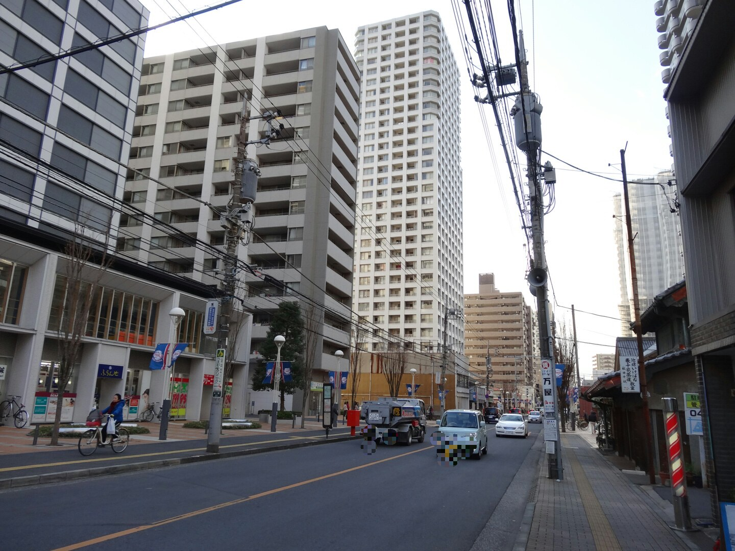 Tokorozwa-ginza-street 2013/12/12